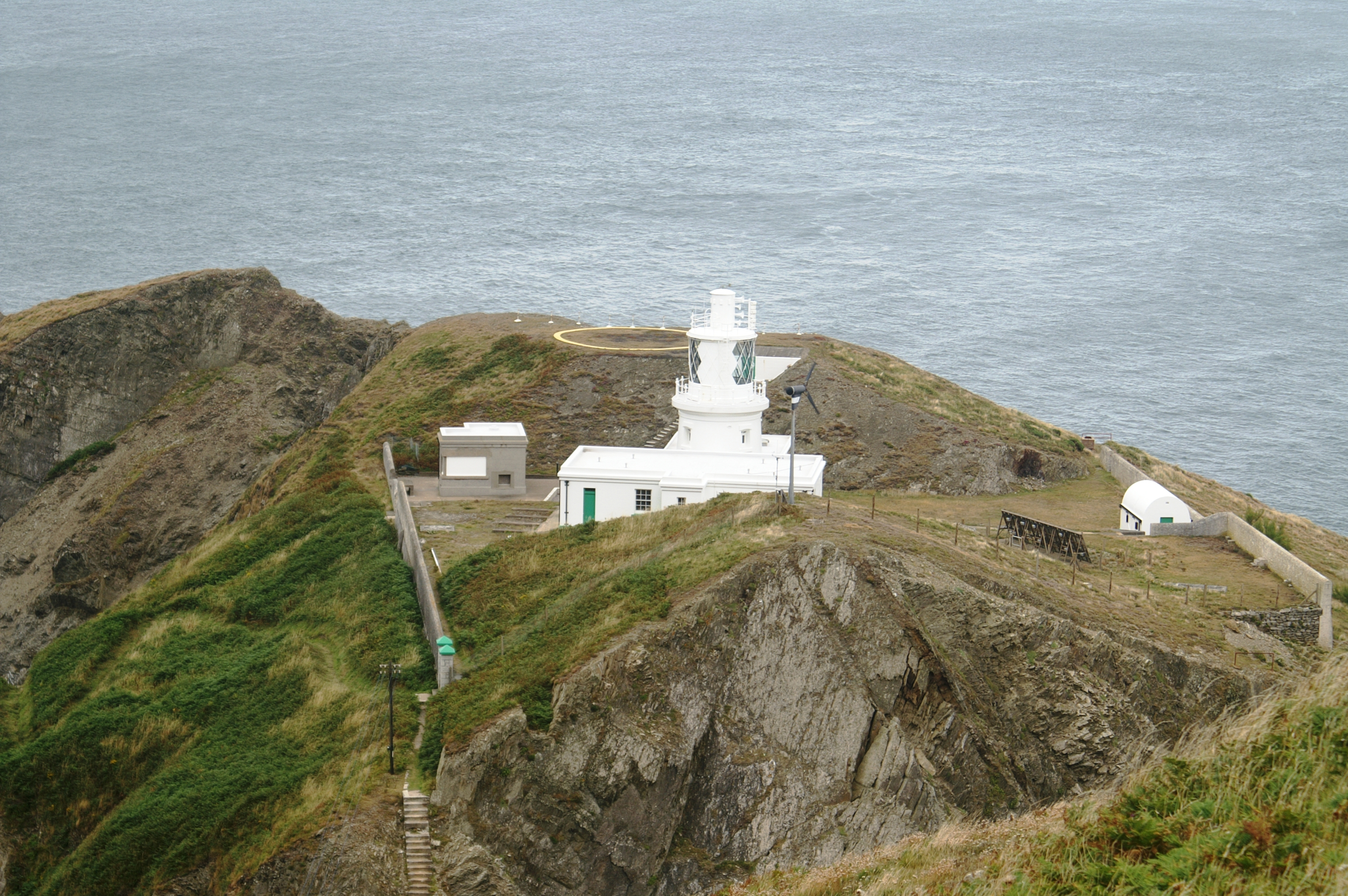 De nieuwe (witte) vuurtoren van Lundy